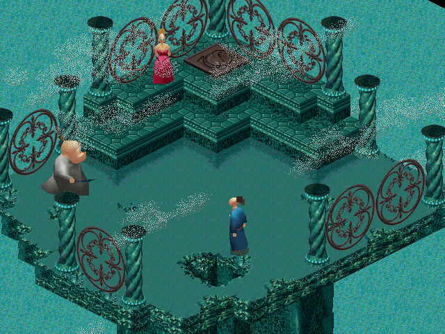 Capture d'écran du jeu vidéo Little Big Adventure (1994), développé par Adeline Software International.